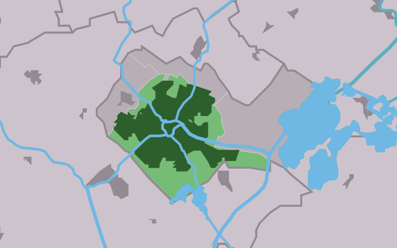 Kaartsje fan himrik fan Snits